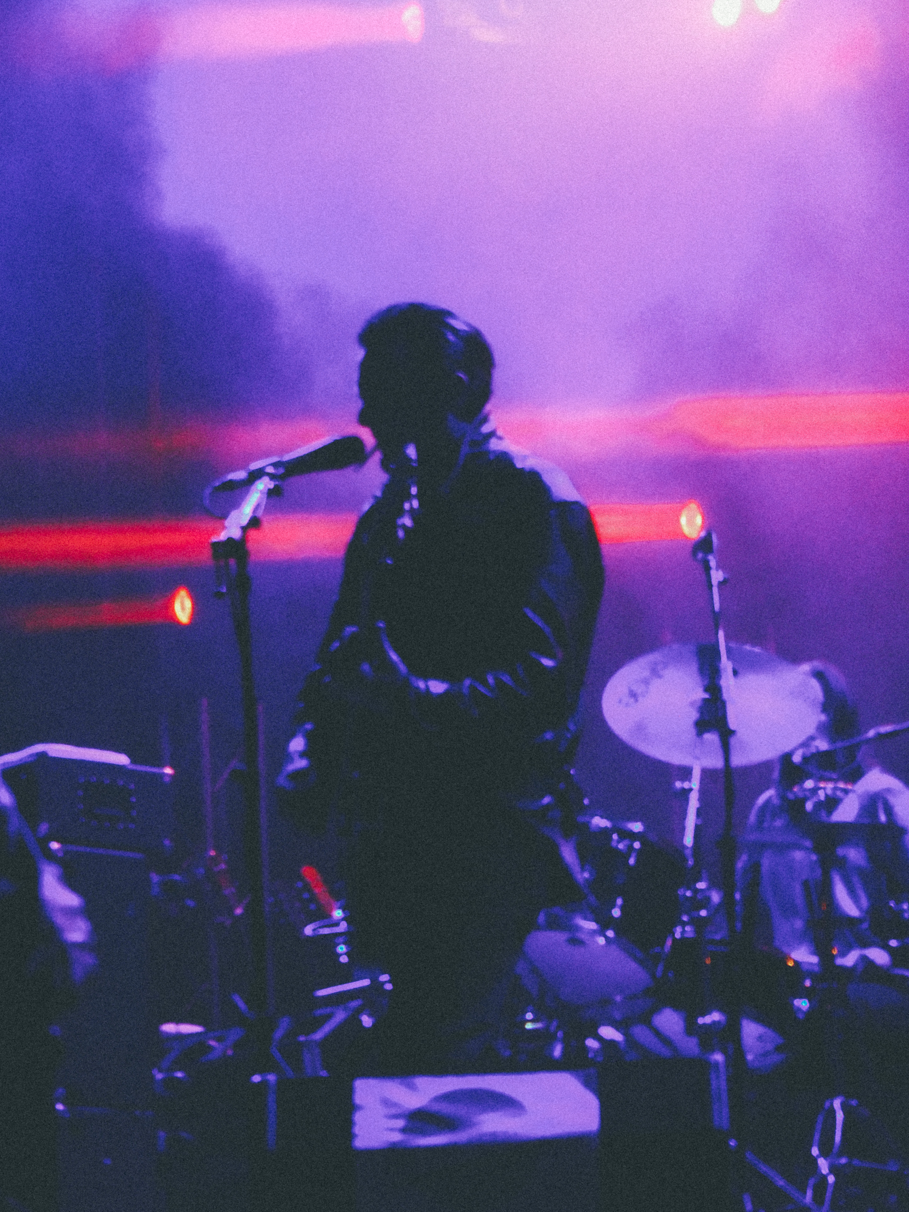 Black Rebel Motorcycle Club, 101 Sun Festival 2014, Málaga, España.